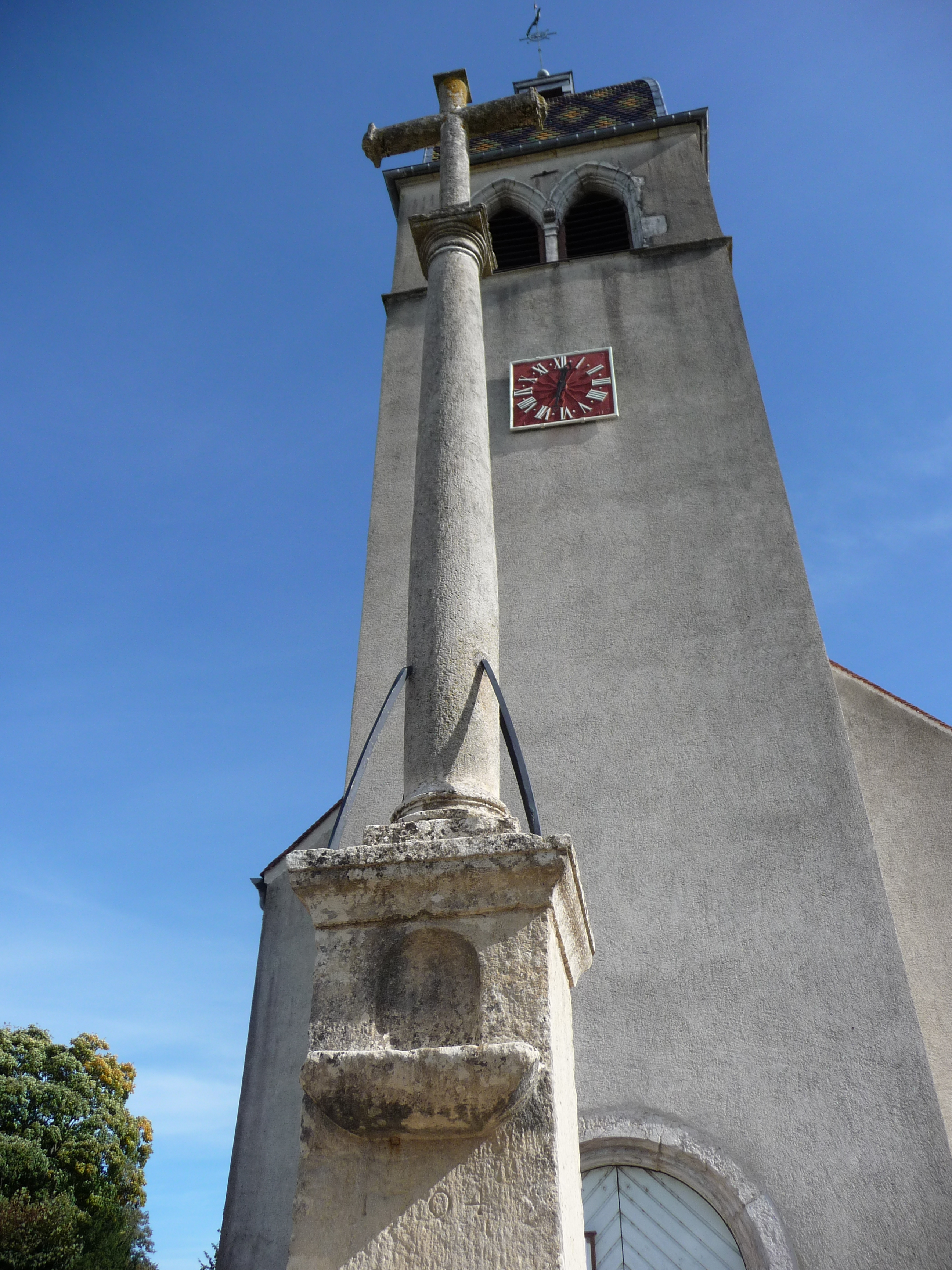 calvaire (gravé 1704) et clocher en arrière plan. Toit en tuiles colorées